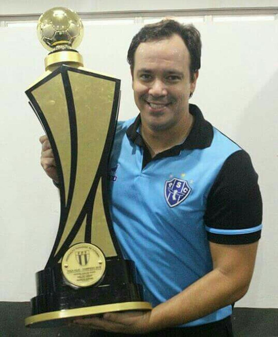 Ex Técnico do paysandu campeão Estadual 2016